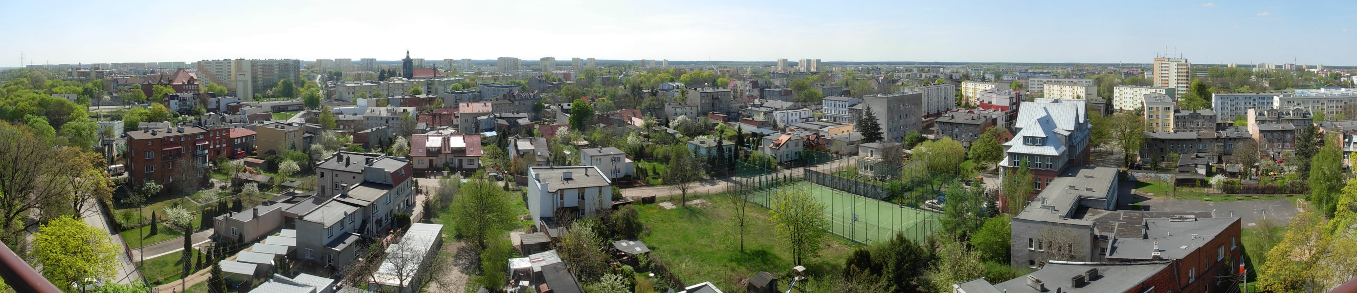 Widok z wieży ciśnień w Bydgoszczy w kierunku osiedla Szwederowo - panorama